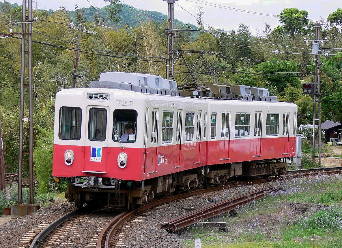 高松琴平電気鉄道志度線房前駅にて 進入してくる志度行き列車の700形